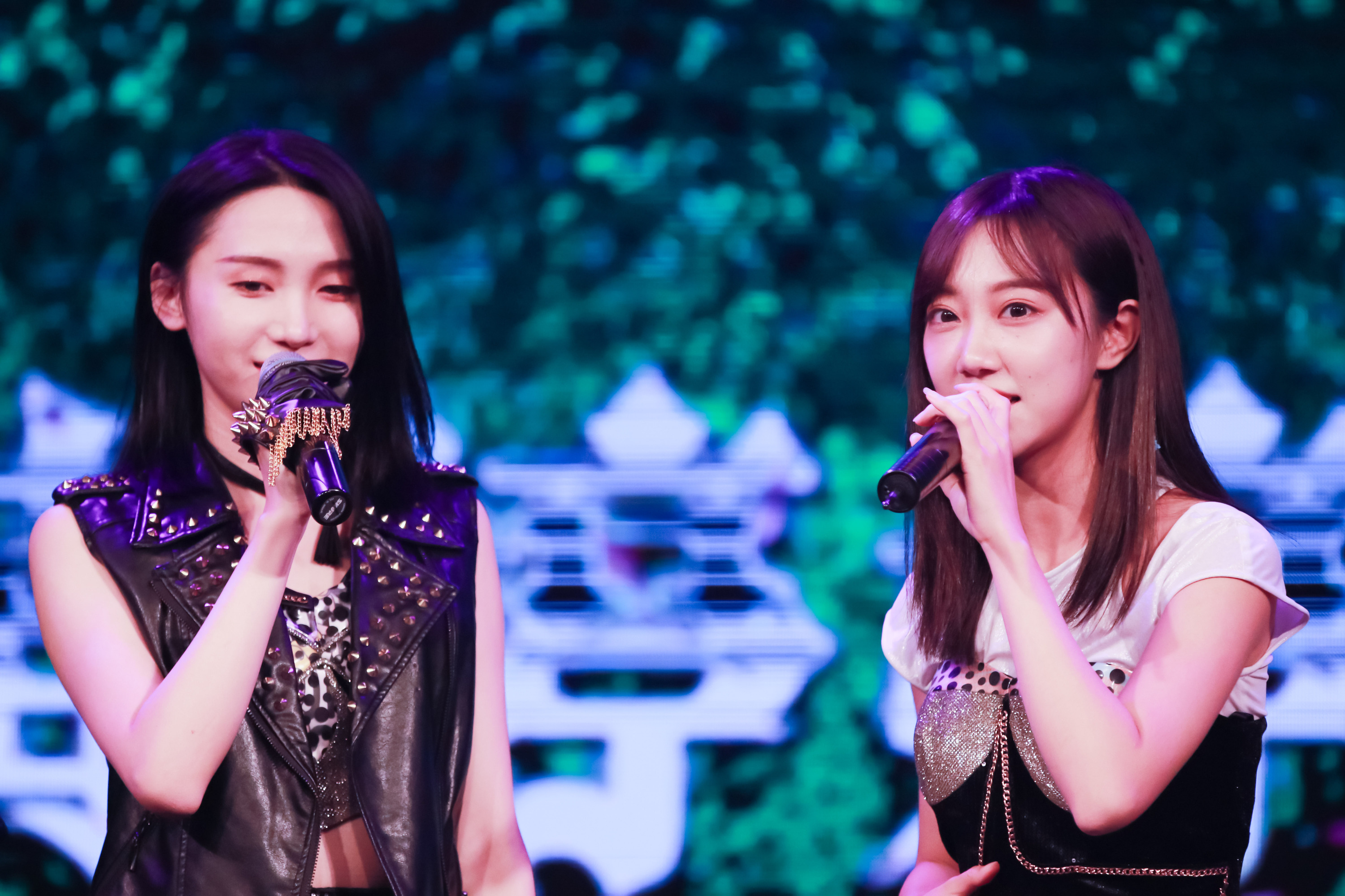 170908 in浅水湾 10P